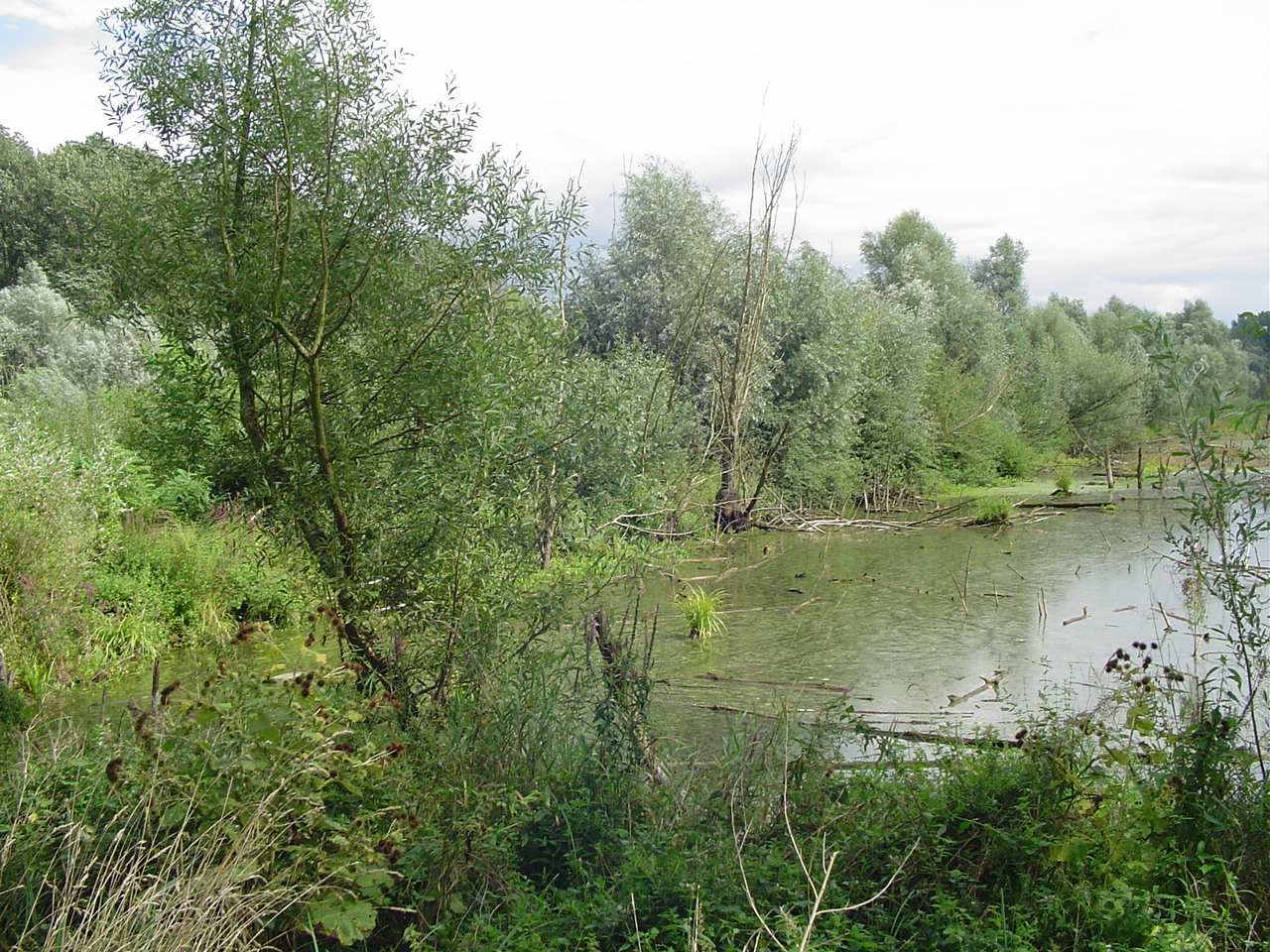 Worringer Bruch